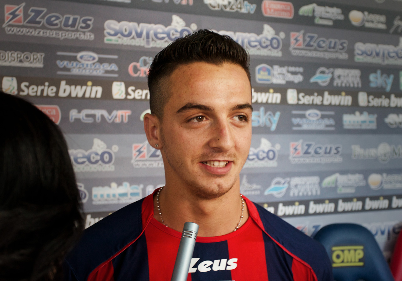 Primo piano di Raffaele Maiello